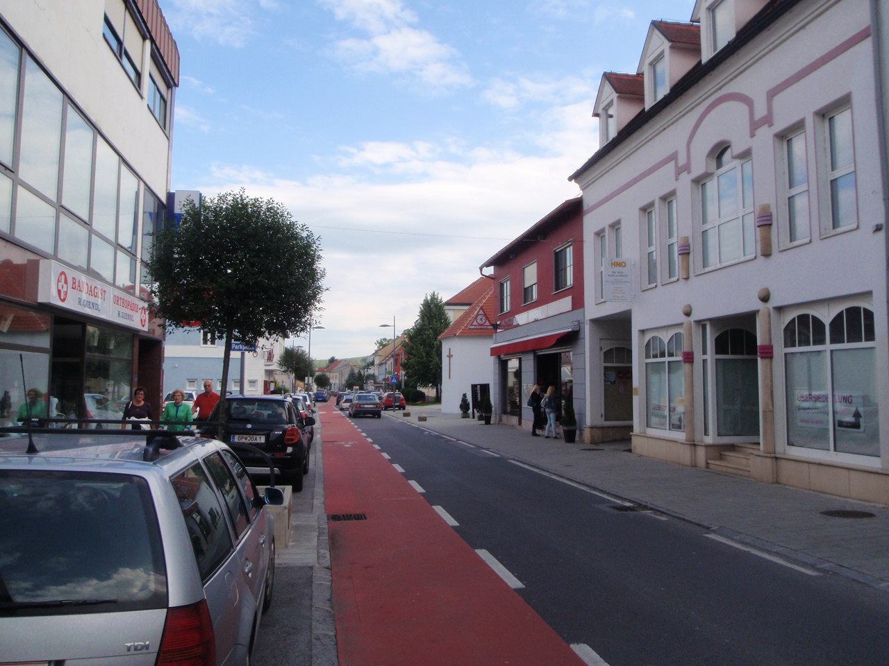 Oberpullendorf, Hauptstrasse